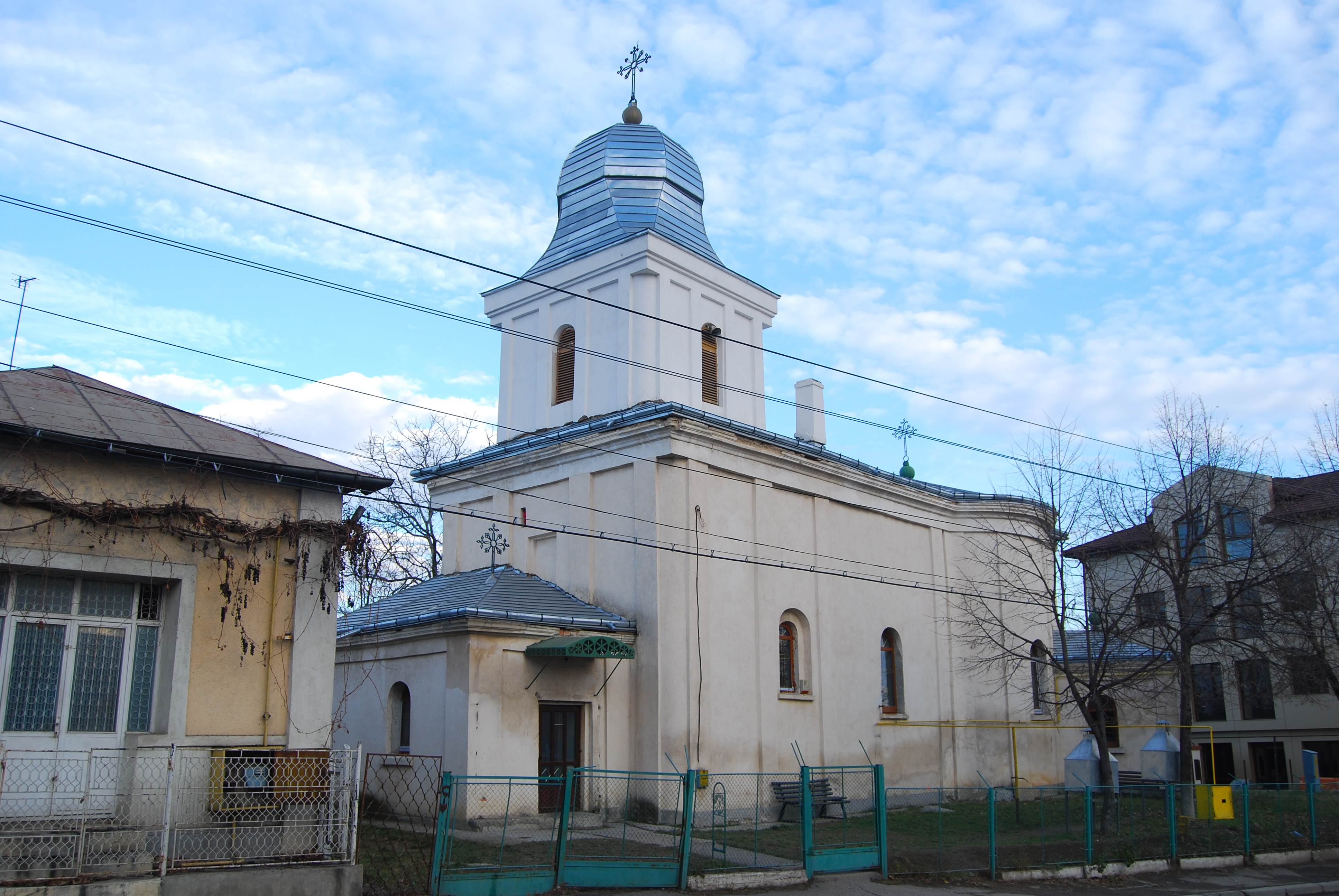 Biserica "Adormirea Maicii Domnului", "Sf. Antonie" (Biserica Vulpe)